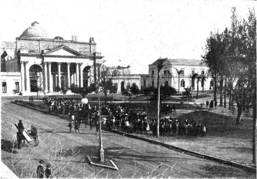 Alumnos de la Escuela Normal de Concepción del Uruguay festejando el Dia del Arbol en la Plaza Ramírez.